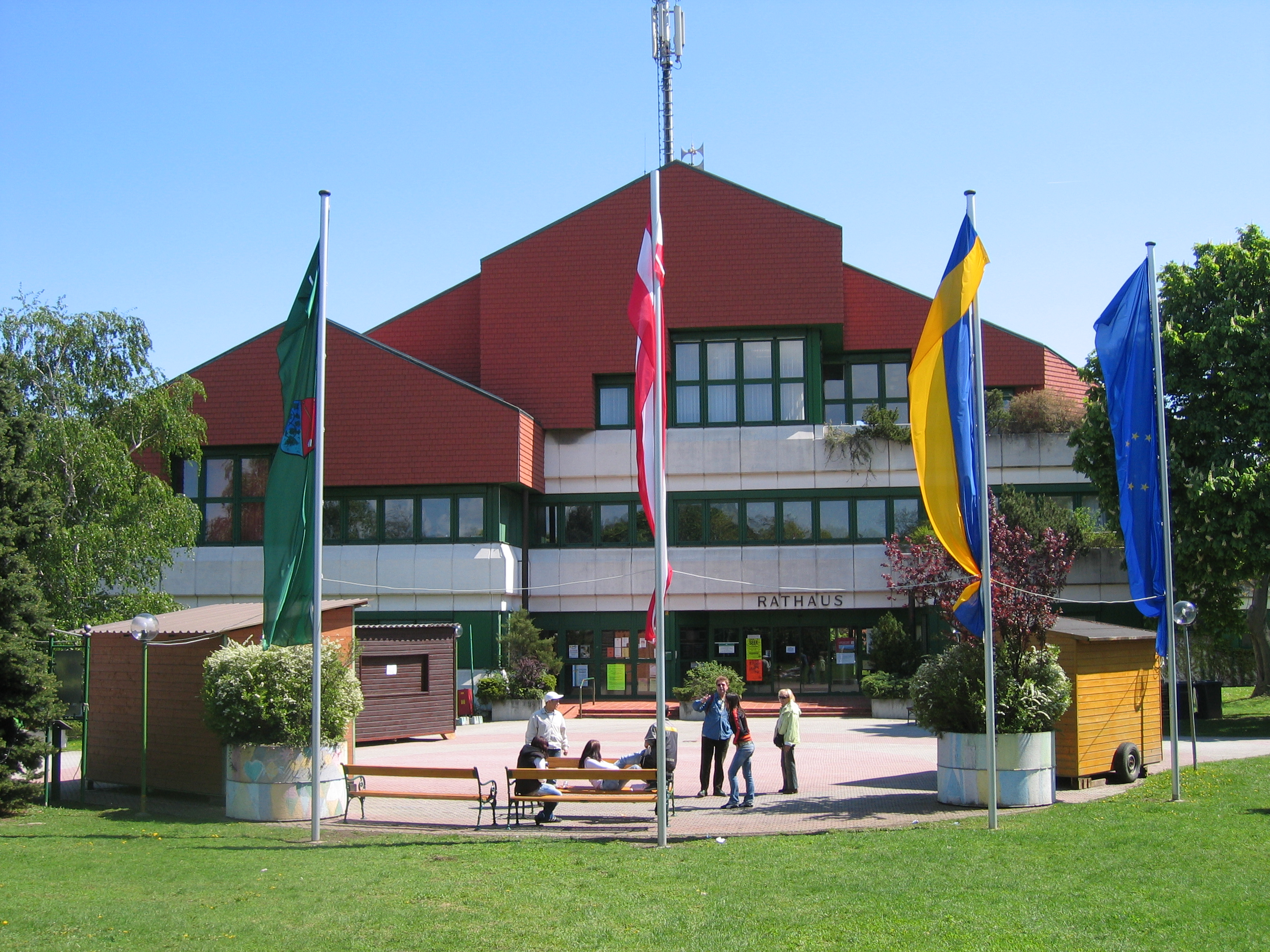 Das alte Rathaus von Guntramsdorf, NÖ, Österreich (abgerissen Jänner / Februar 2015)